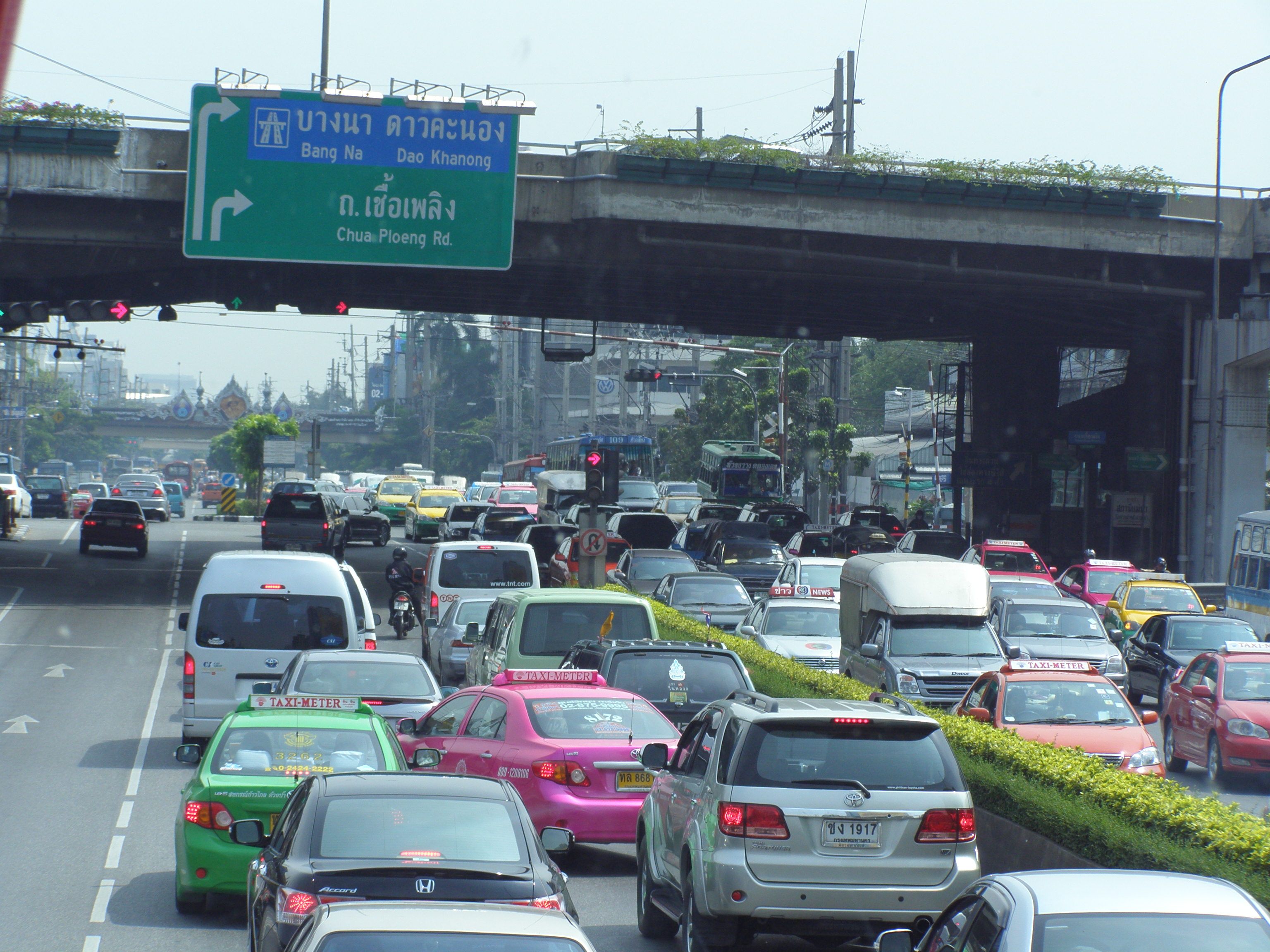 View Bangkok By HS3CMI